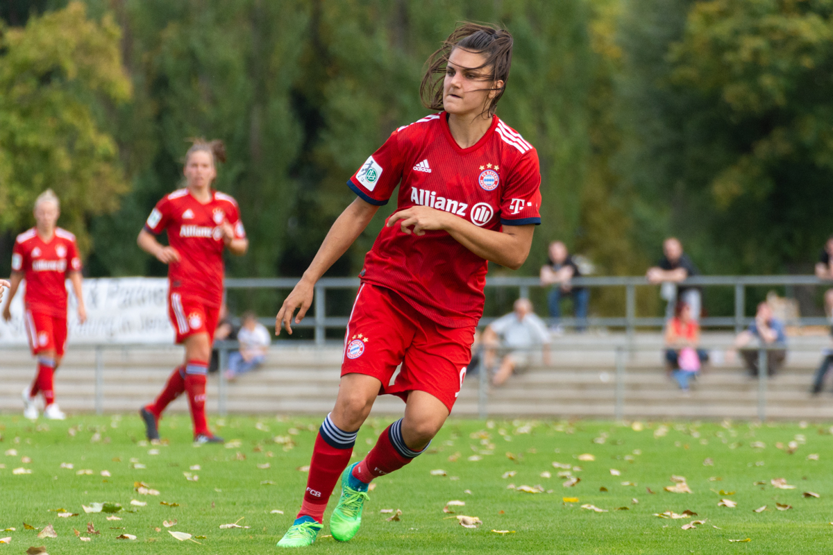 Jovana Damnjanović im DFB-Pokal-Spiel gegen den FF USV Jena